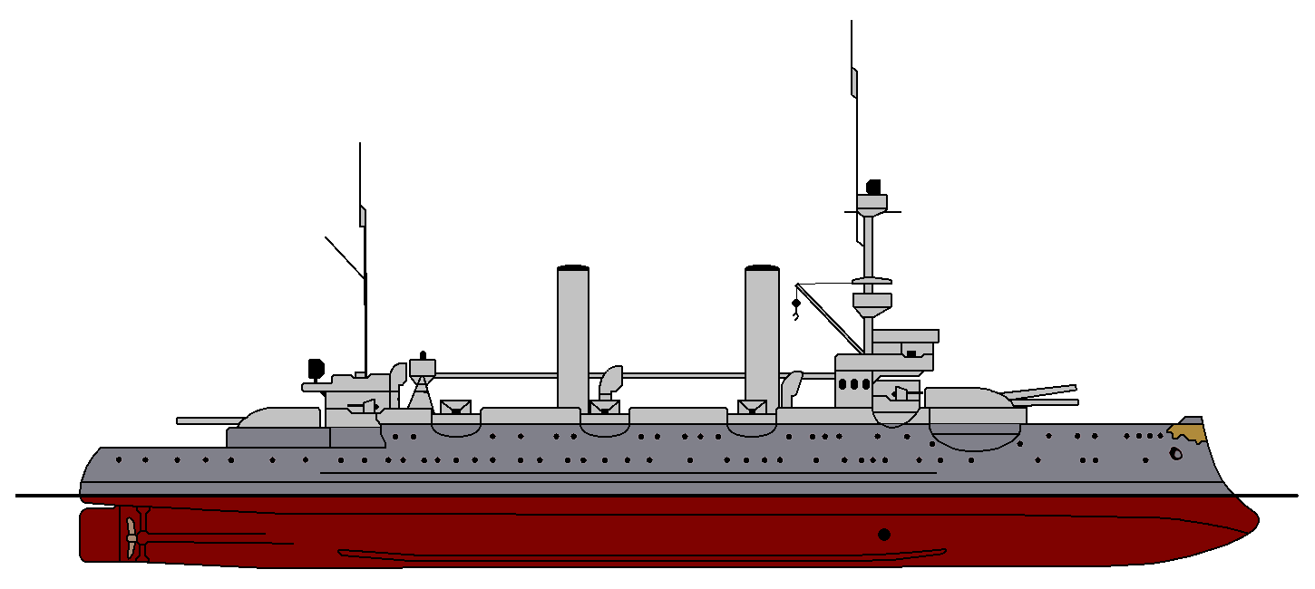 Seitenriss des deutschen Küstenpanzerschiffs SMS Hagen im Zustand von 1910 mit der ab 1895 gültigen Farbgebung von steuerbord.